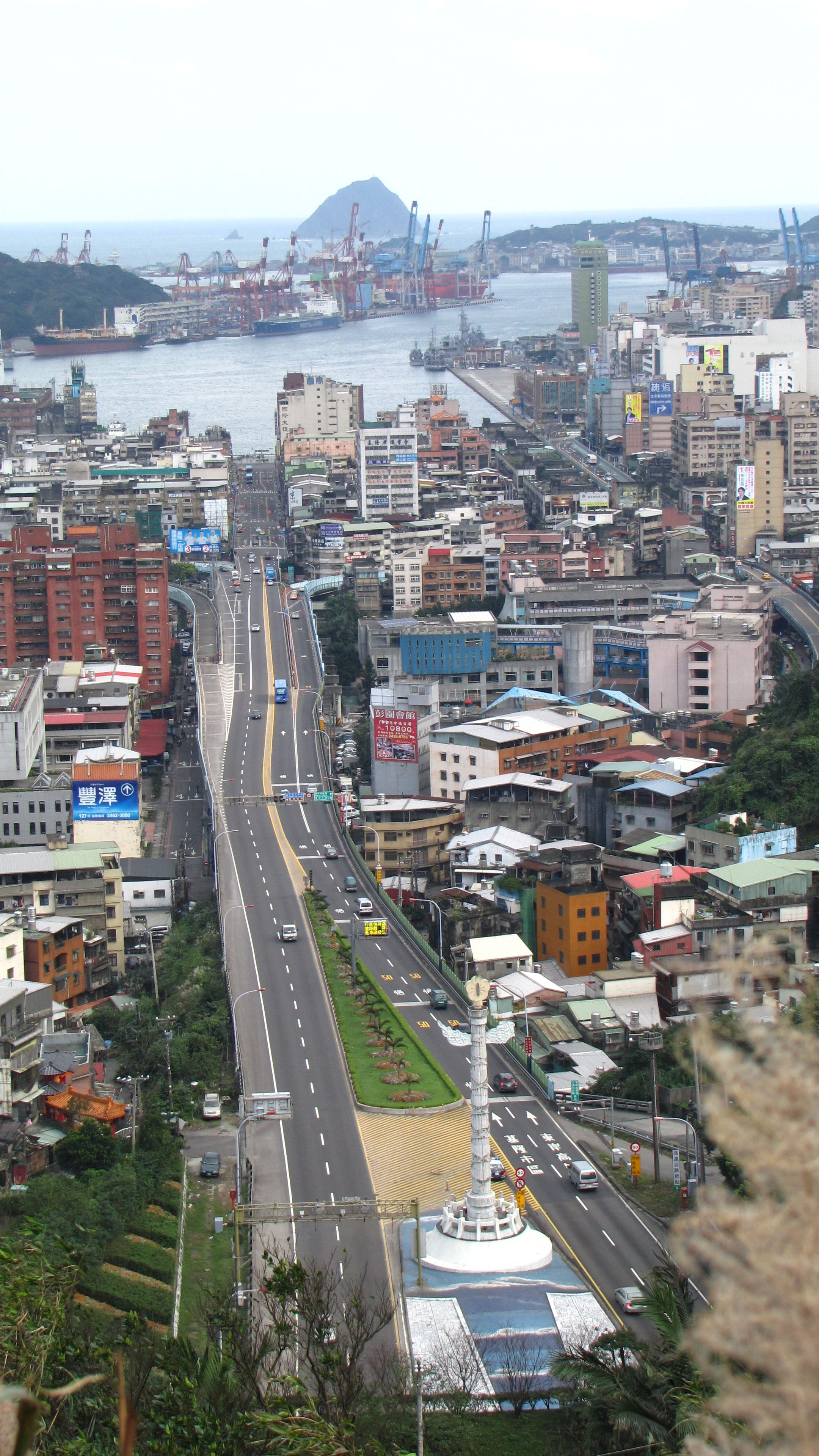 獅球嶺眺望基隆港